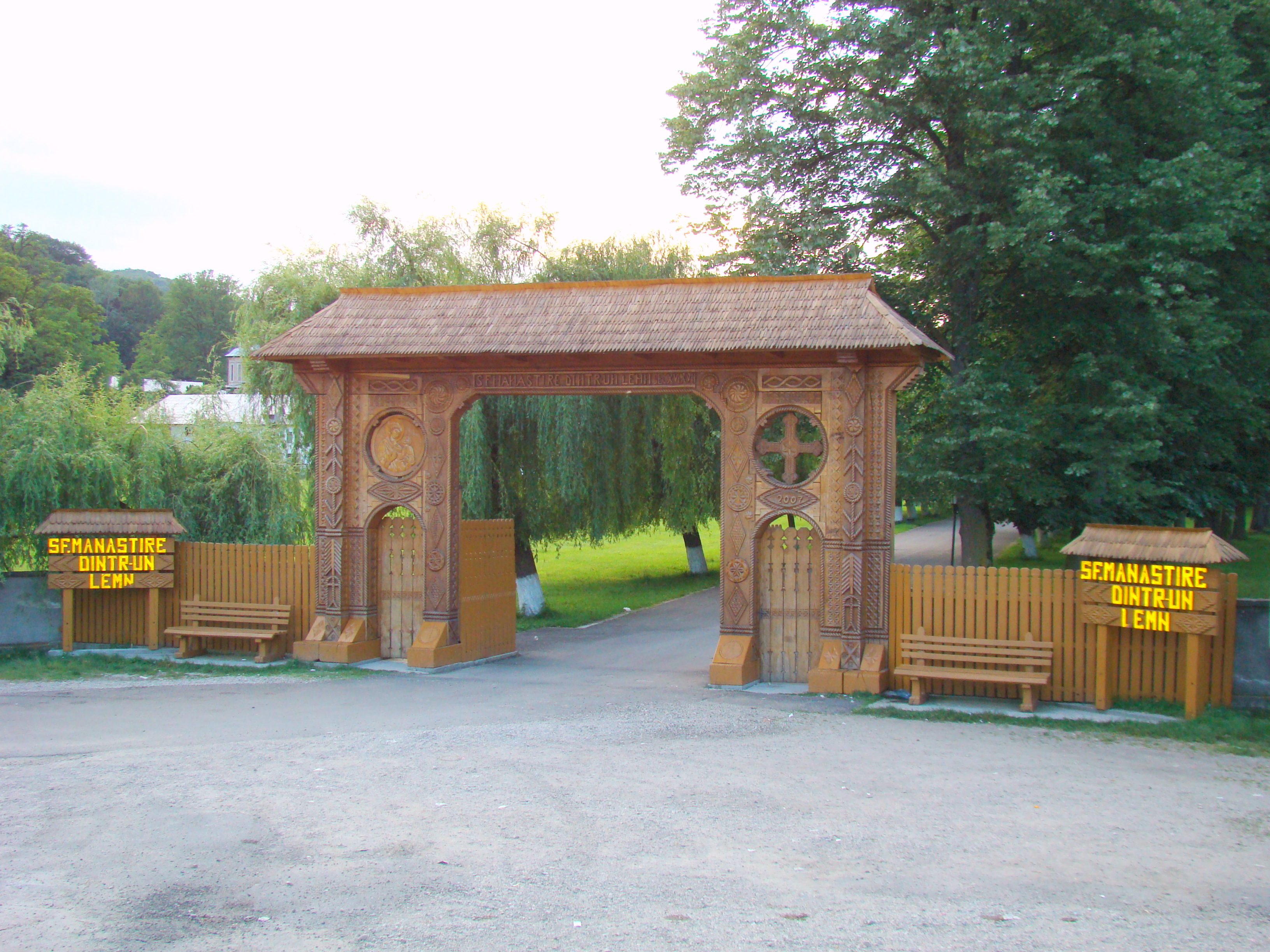 Mănăstirea dintr-un lemn, Frâncești, Vâlcea